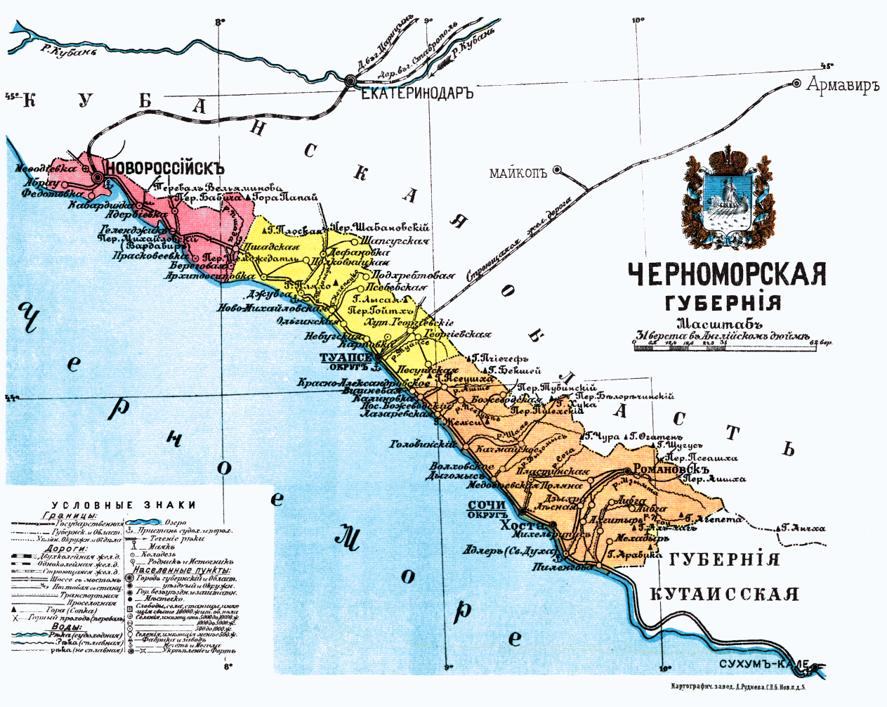 Карта Черноморской губернии, 1913